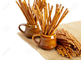 کراکر